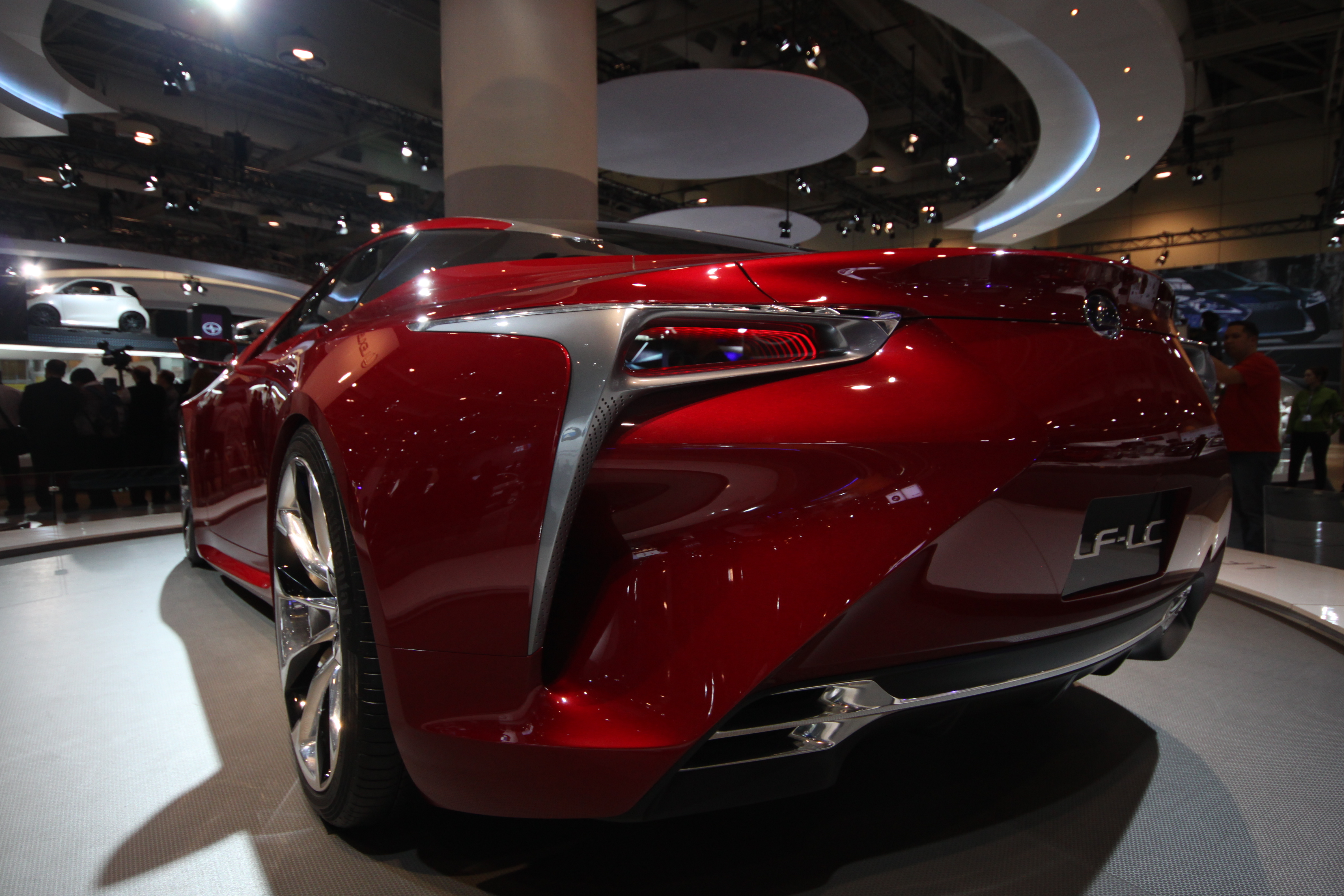 Lexus LF-LC Concept